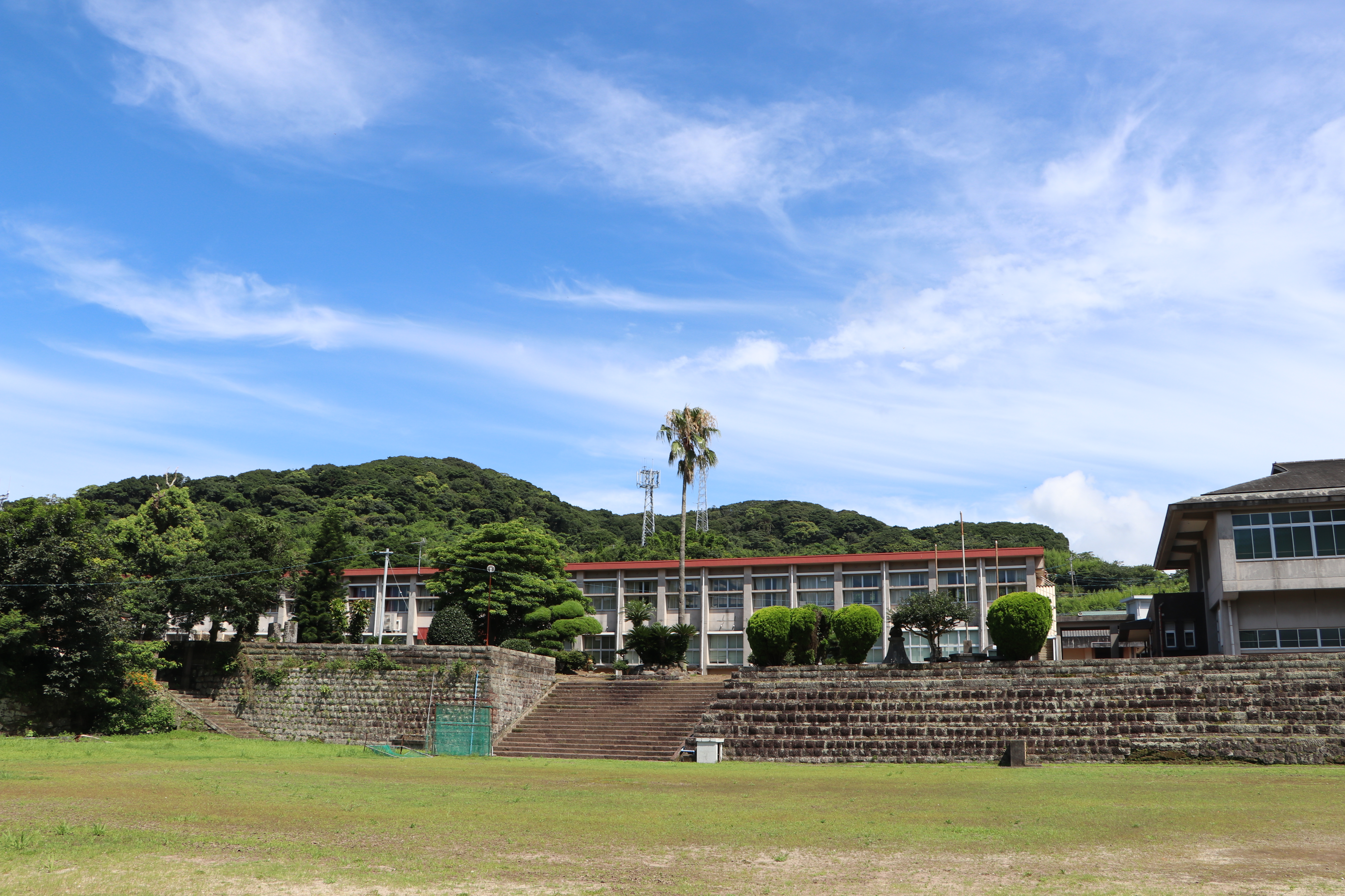 南さつま市立坊泊小学校跡地（旧一乗院跡地）